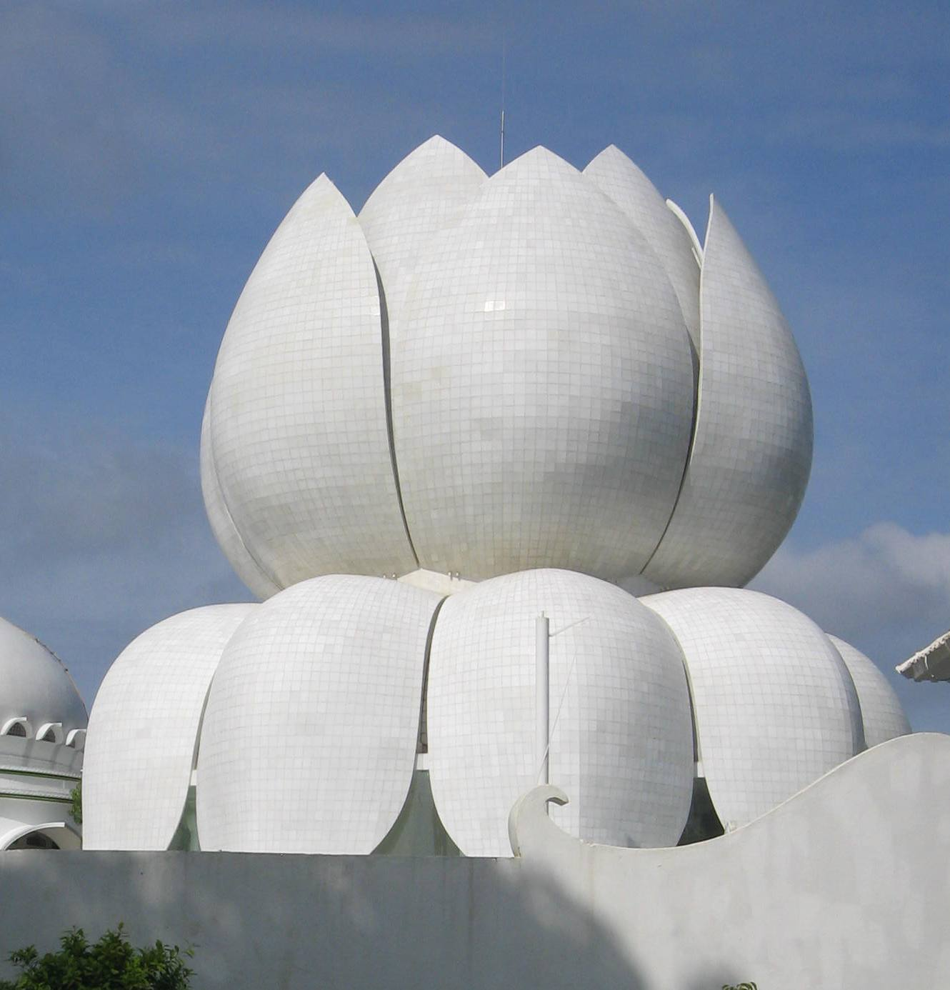 ശാന്തിഗിരി പർണശാല